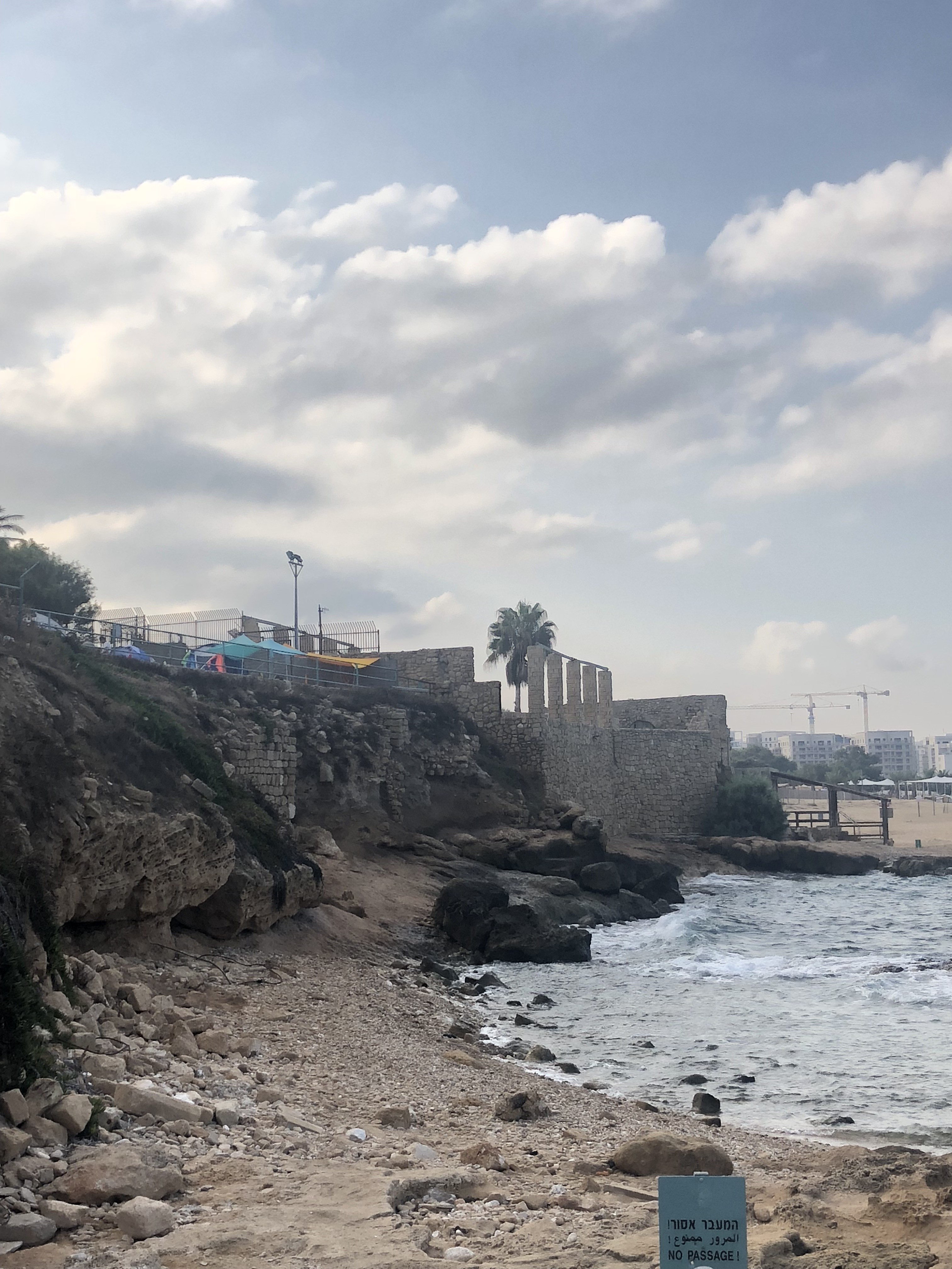 قرية الزيب، آثار قديمة